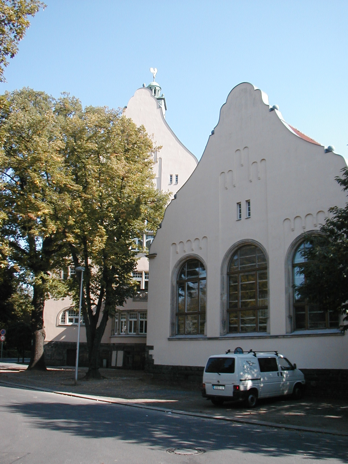 Radebeul Steinbachhaus